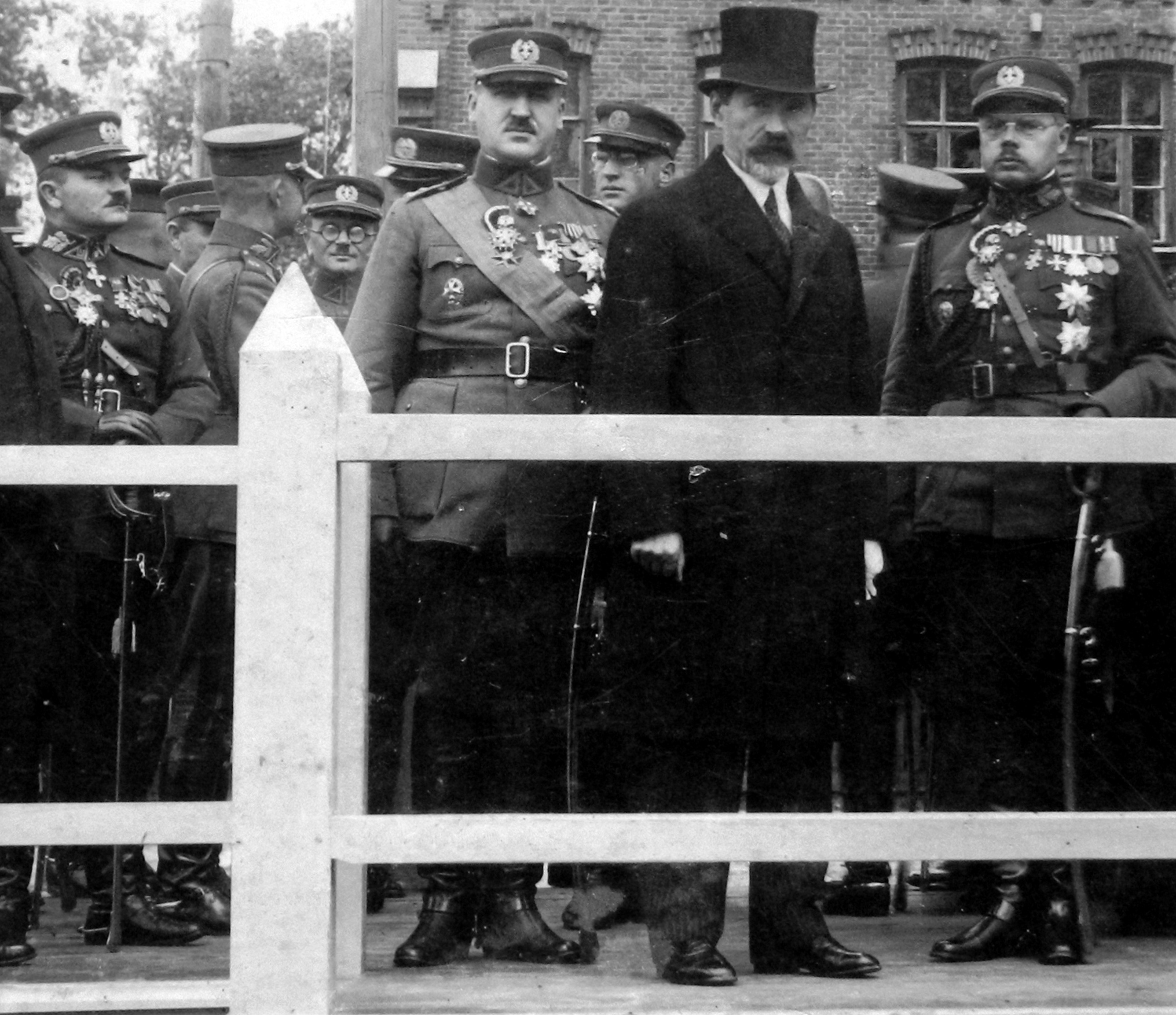 Kairėje - generolas Zenonas Gerulaitis, Smetonos dešinėje - KAM ministras Balys Giedraitis, kairėje - generolas Petras Kubiliūnas.